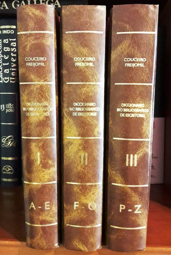 A. Couceiro Freijomil. Diccionario bio-bibliográfico de escritores